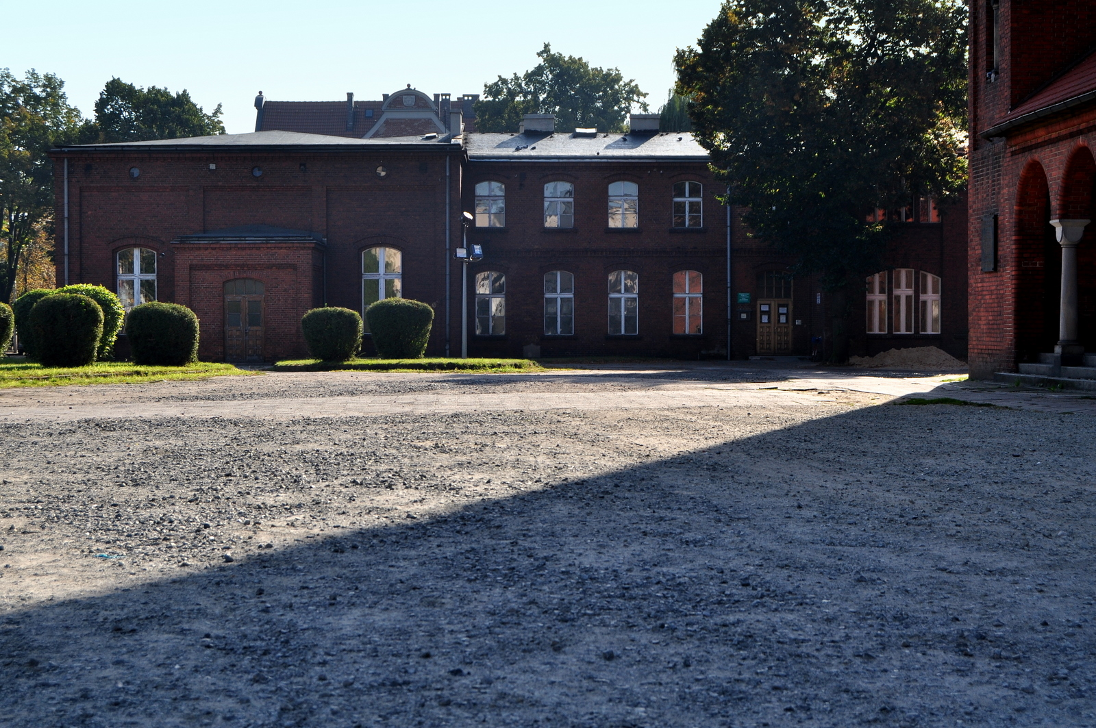 Ostrów Wielkopolski, ul. kardynała Ledóchowskiego 4 - historyczny budynek Domu Katolickiego w zespole konkatedry